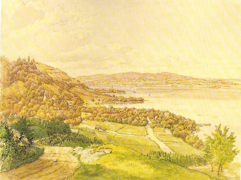 Aussicht vom Schloss Arenenberg nach Mannenbach (Gemeinde Salenstein, Kt. TG); Aquarell von Lorenzo Quaglio d.J., um 1856